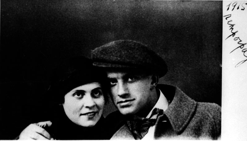 Mayakovsky and Lilya Brik